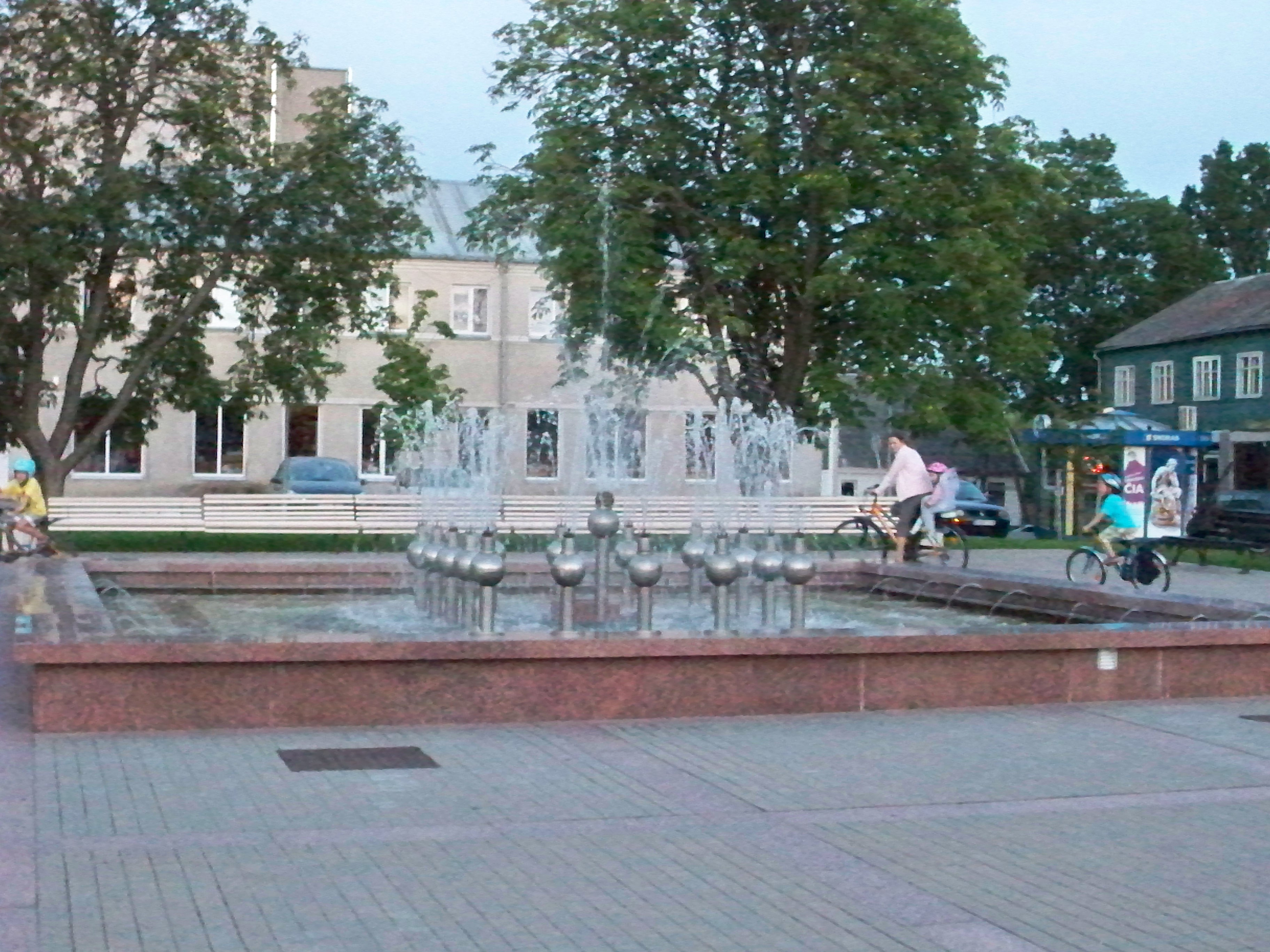 Fontanas miesto centre, Plungė